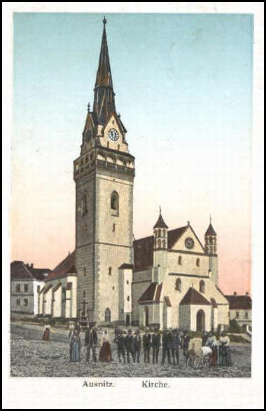 Hustopeče - kostel svatého Václava, zbořen 1962.